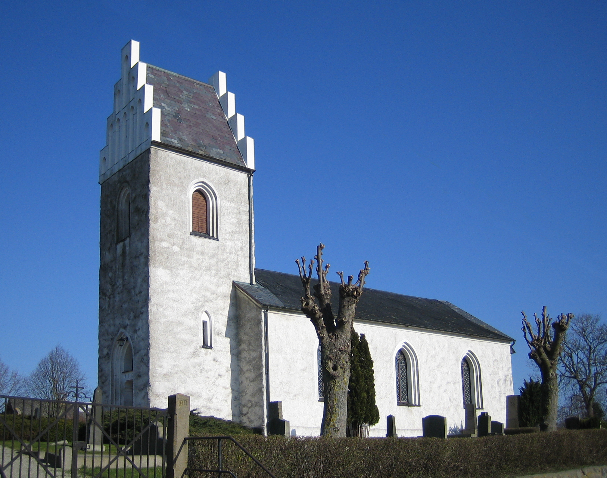 Virke kyrka in Skåne, Sweden